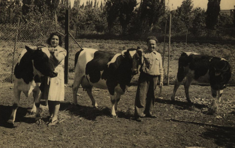 שושנה ואברהם קליינר בחצר ביתם בהרצליה עם הפרות (בשנות העשרים)